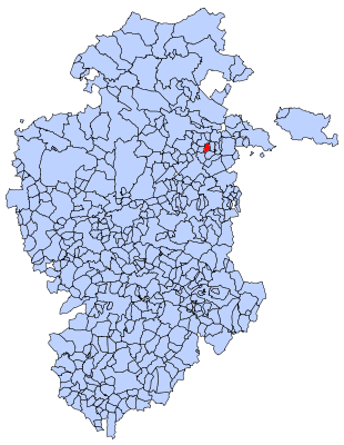 Fuentebureba en Burgos